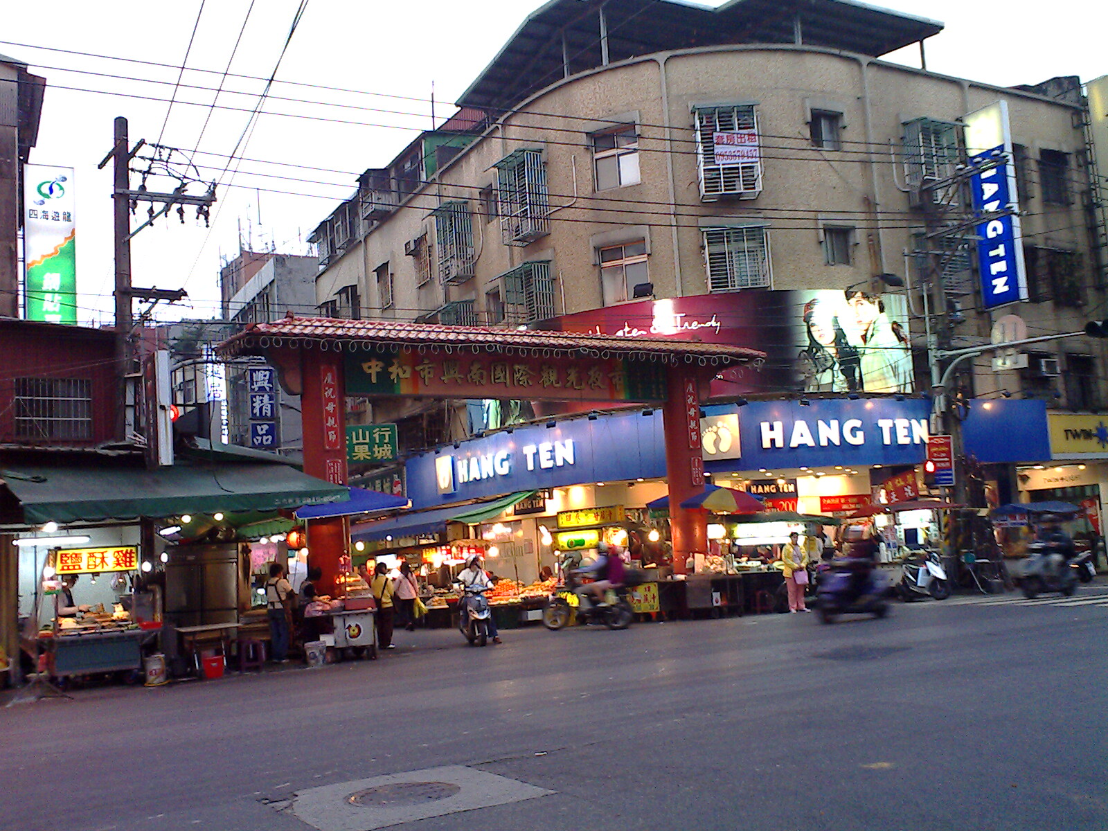 臺北縣中和市興南路國際觀光夜市。